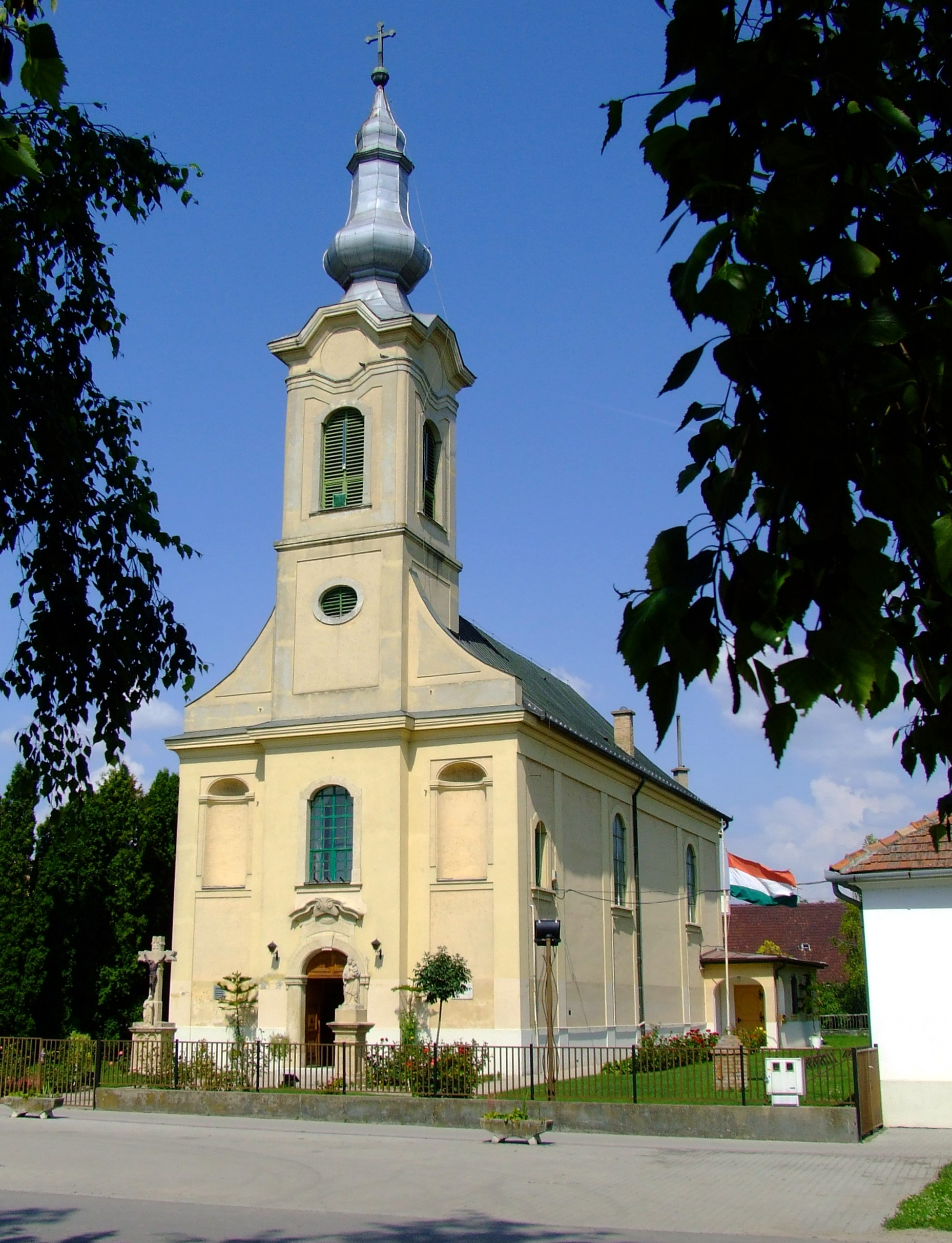 Magyarok Nagyasszonya-templom Dunapatajon. Épült 1761-ben copf stílusban. Ezen a templomon hajtották végre Magyarországon az első épületelhúzást Möller Károly építész vezetésével 1934-ben